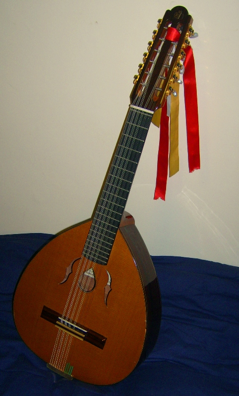 Fotografía de un laúd español actual